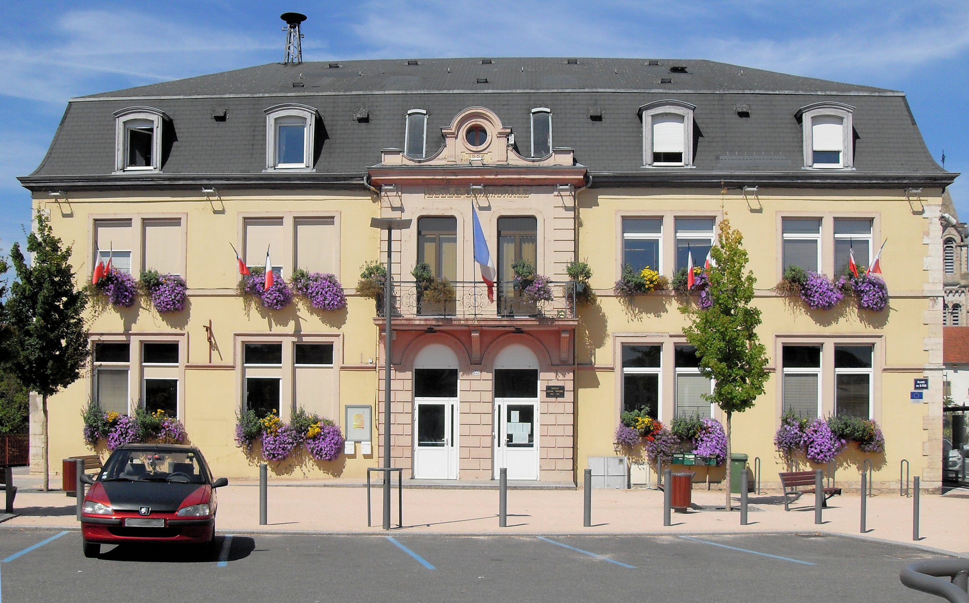 L'école élémentaire «Louise Michel» de Seloncourt